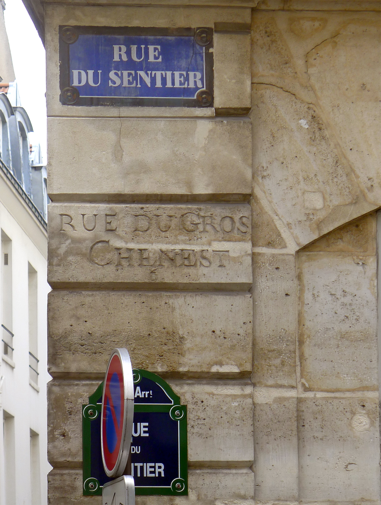 Rue du Sentier (plaques et ancien nom) - Paris II